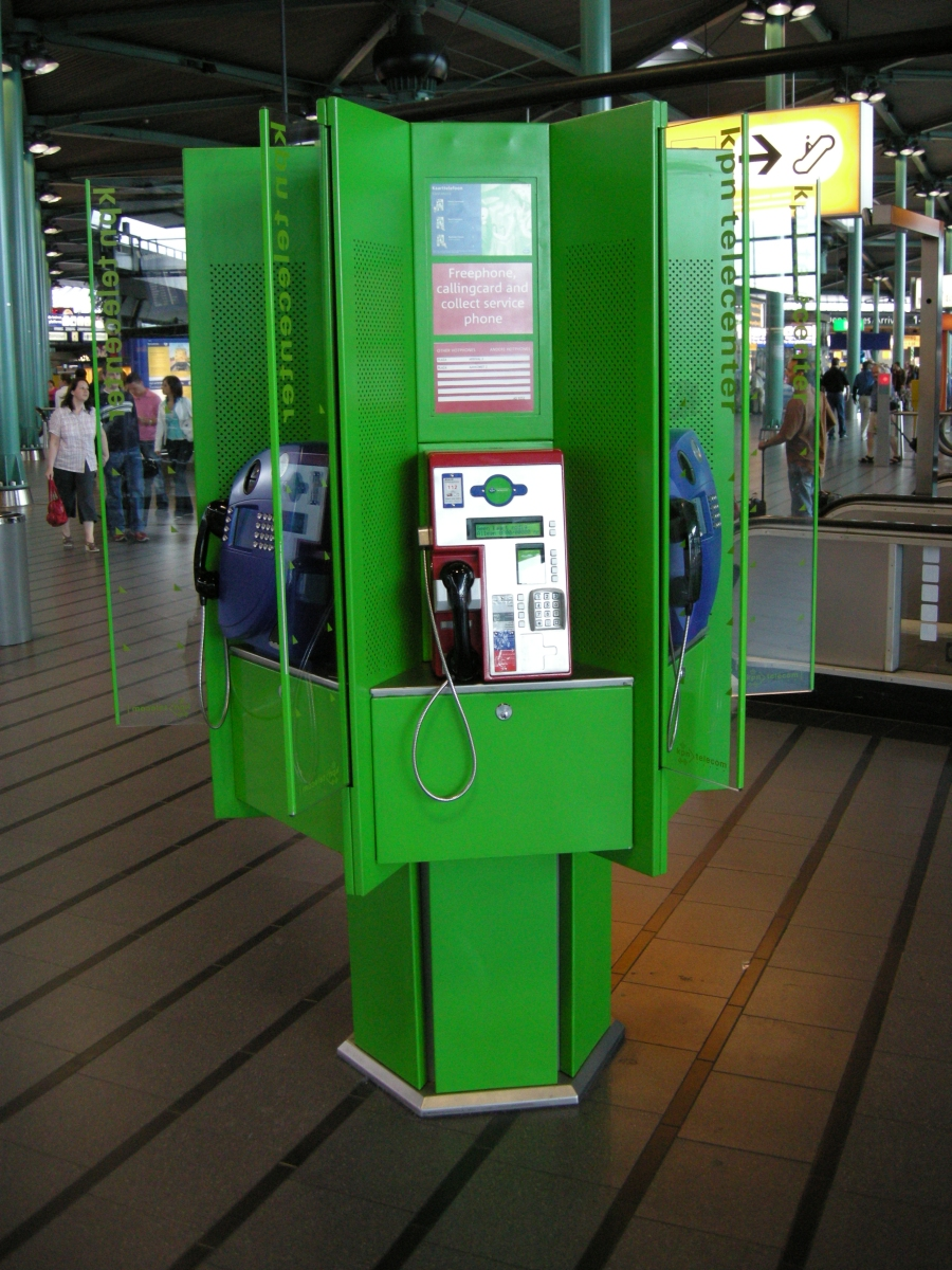 Een zesvoudige telefooncel op Schiphol